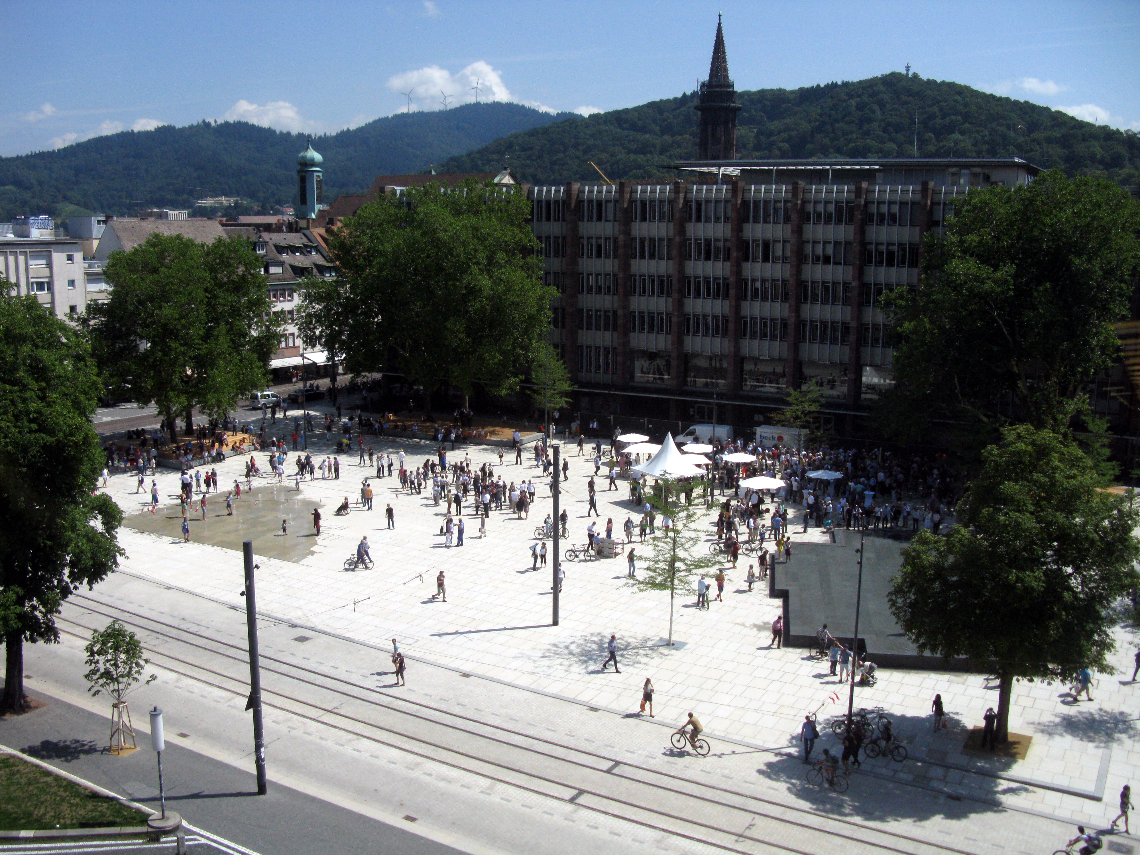 Freigabe des umgebauten Platzes der Alten Synagoge in Freiburg am 2. August 2017 von der Universitätsbibliothek gesehen, dahinter das Kollegiengebäude II